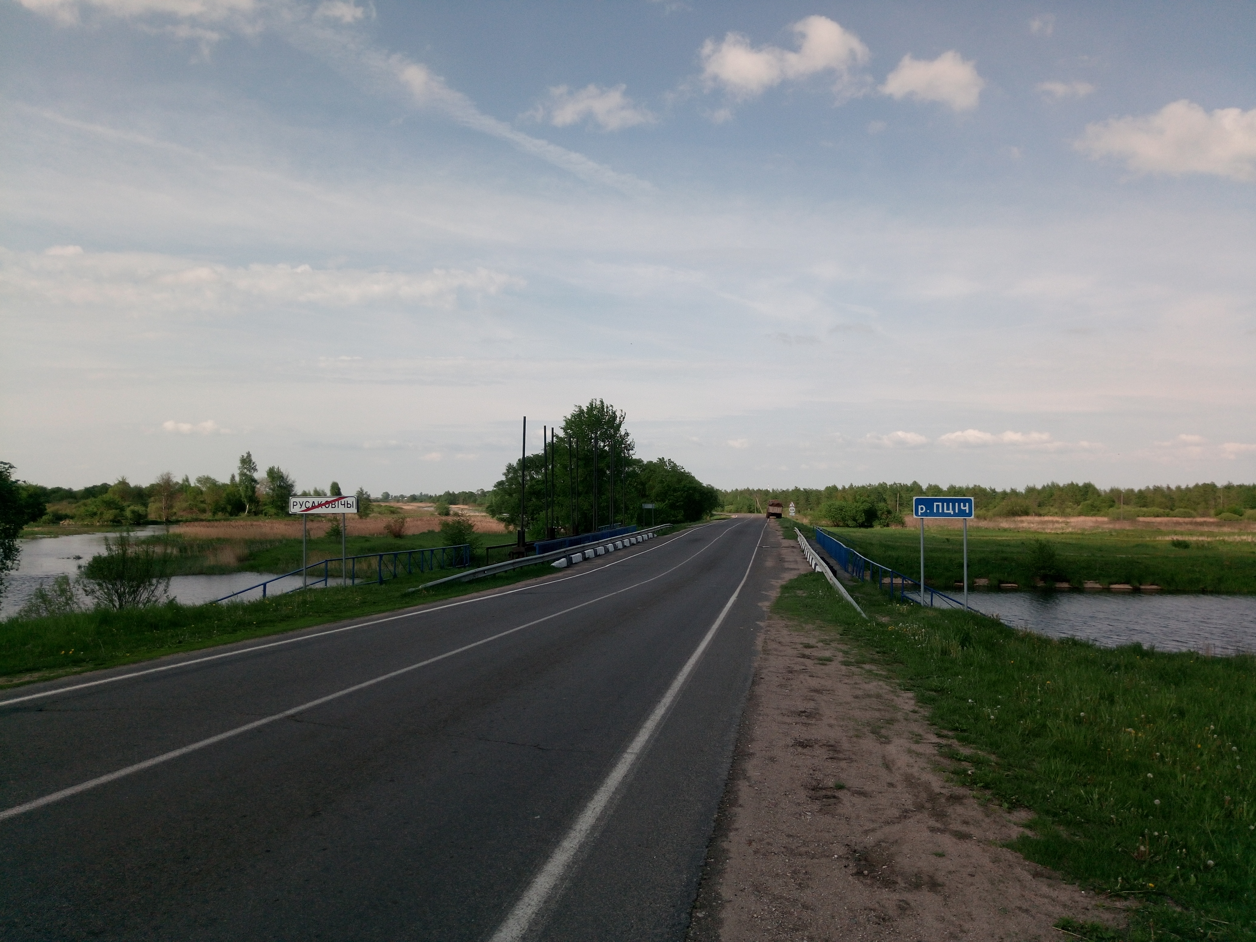 Мост.